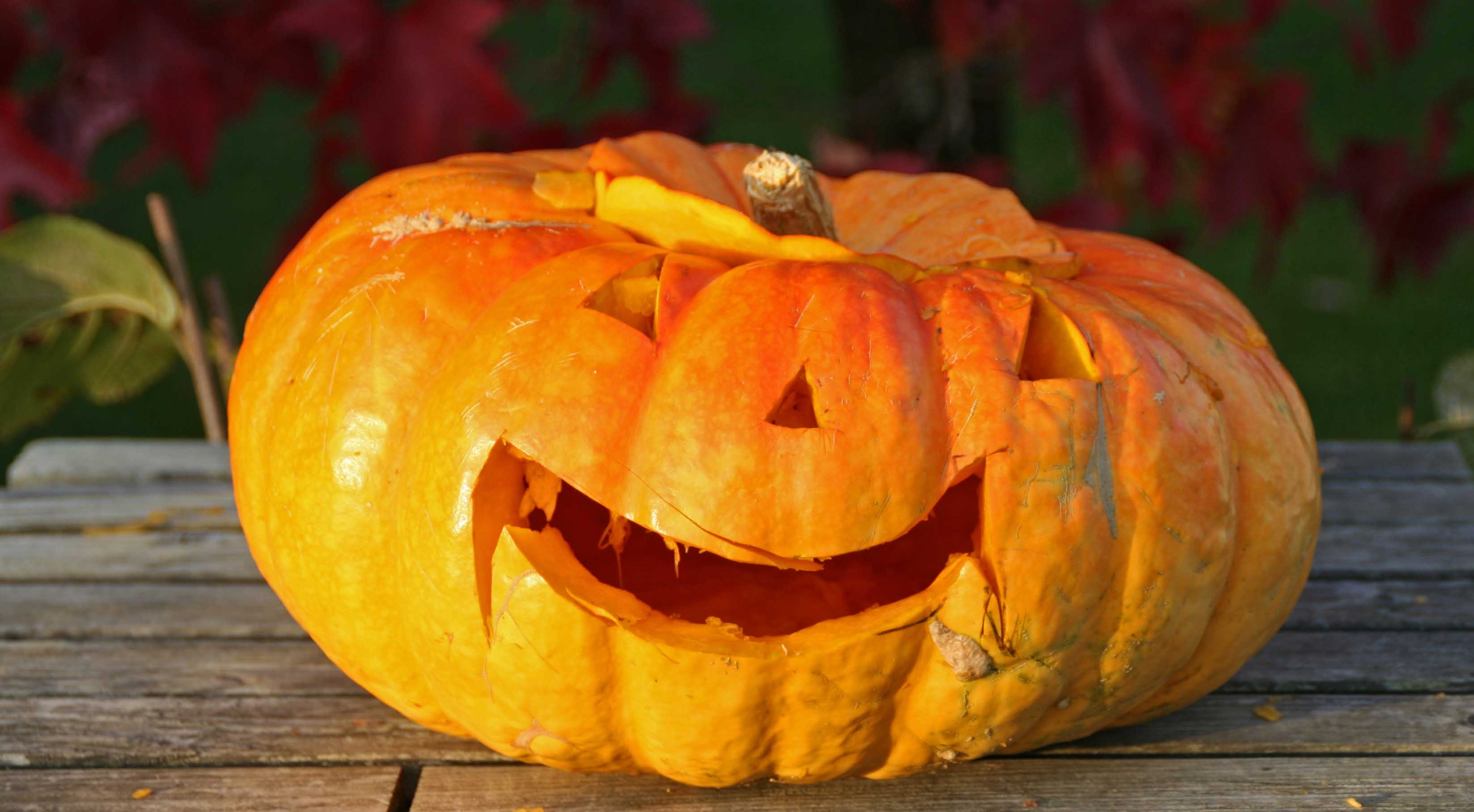 E "modernt" Trauliicht, aus enger Kalbass geschnëtzt.